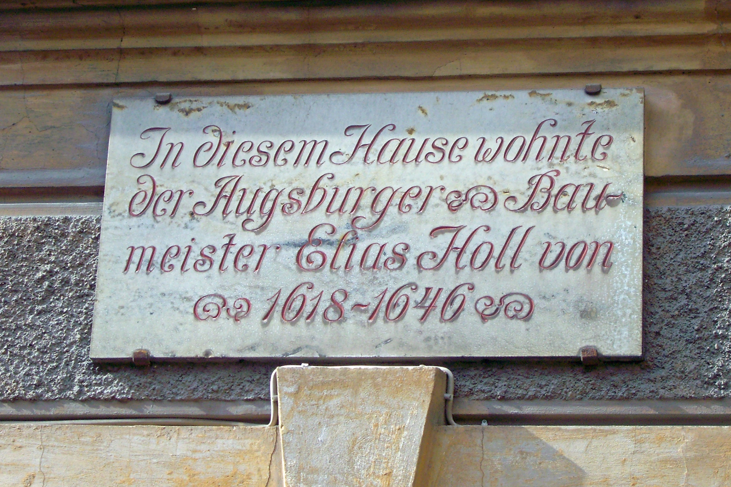 Tafel am Wohnhaus von Elias Holl, Augsburg, Kapuzinergasse. Text: In diesem Haus wohnte der Augsburger Baumeister Elias Holl von 1618–1646